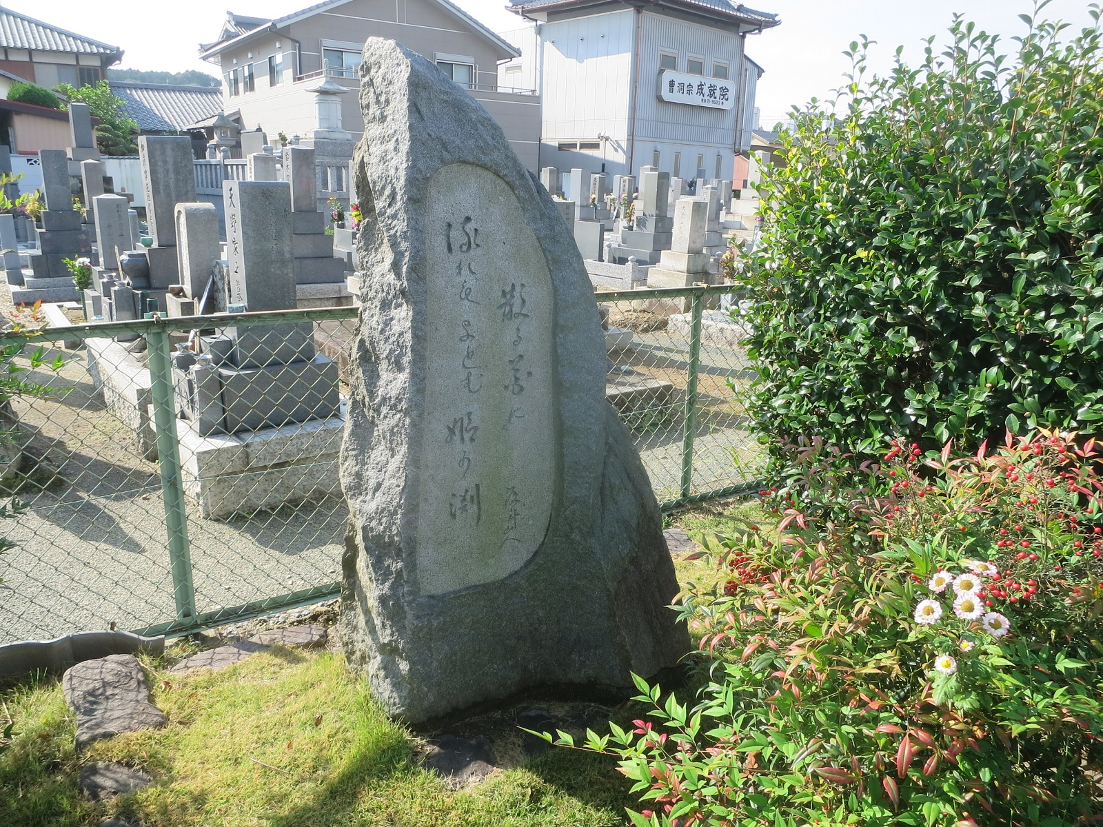 岡崎市吹矢町の浄瑠璃ヶ淵跡に建てられた句碑。1964年12月建立。